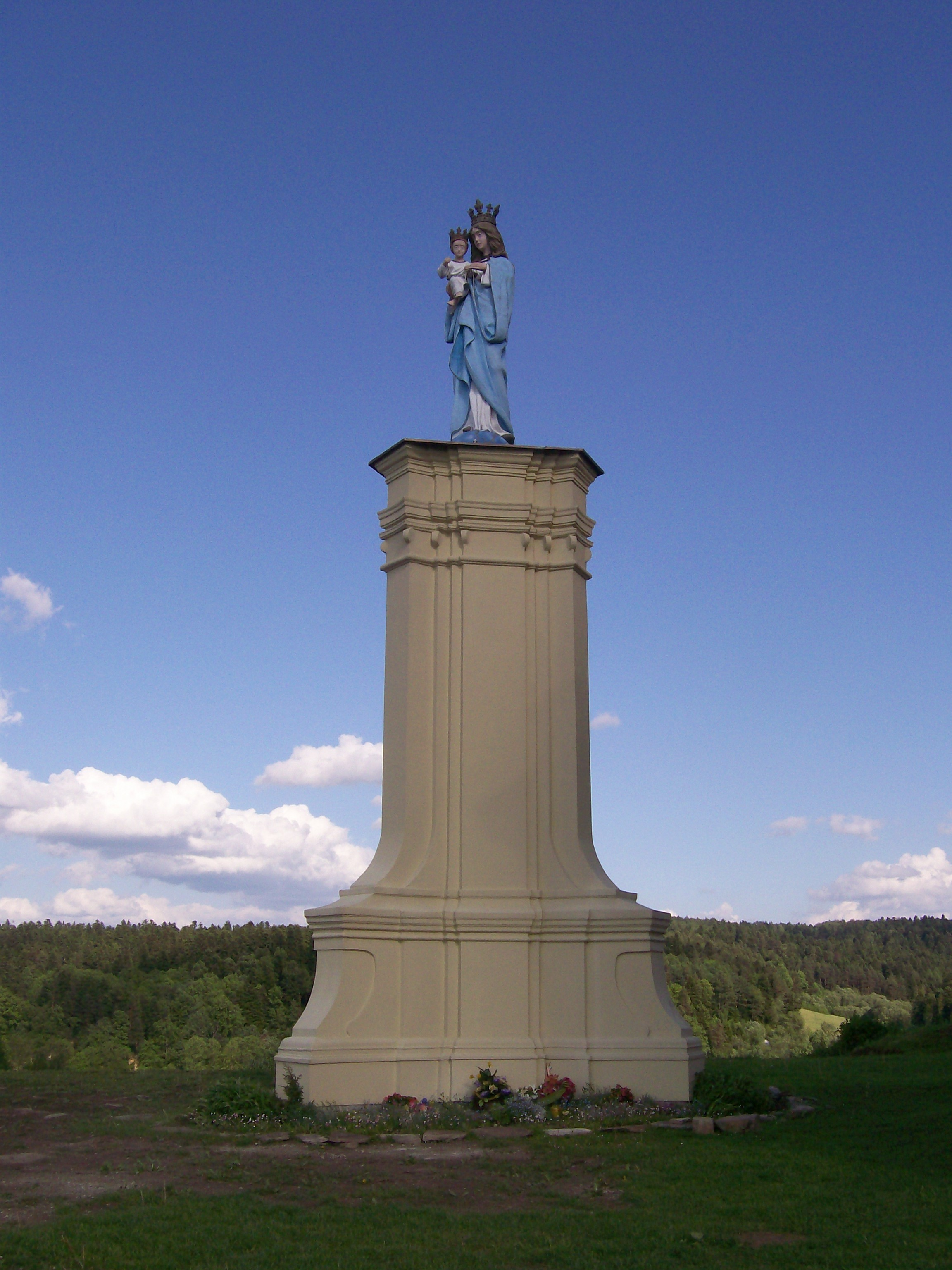 Kolumna z figurą Matki Boskiej - klasztor Karmelitów Bosych w Zagórzu